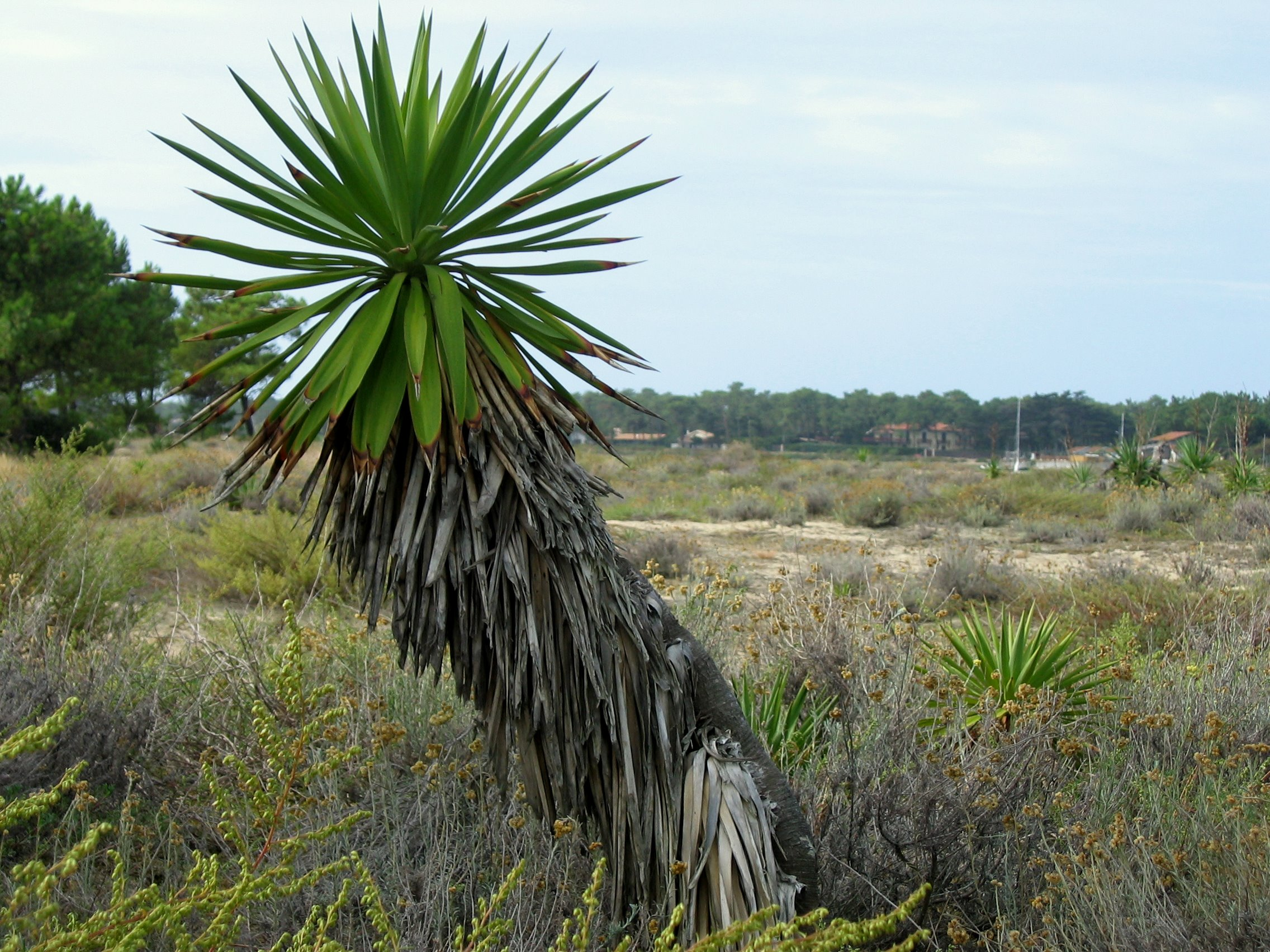 Yucca gloriosa au Cap Ferret (Gironde, Aquitaine, France)